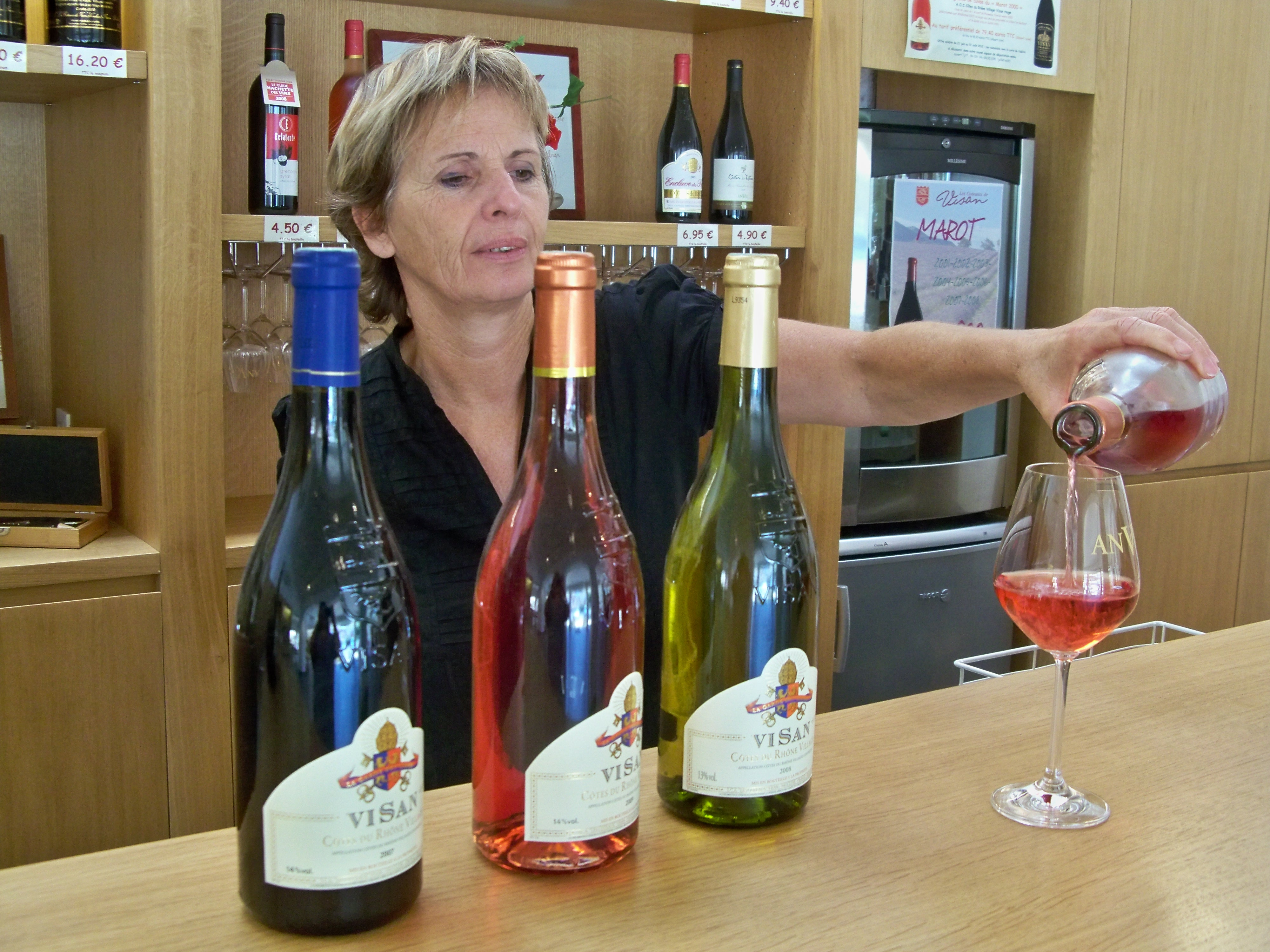 Cave de Visan, gamme de Côtes du Rhône de l'Enclave des Papes, Vaucluse, France